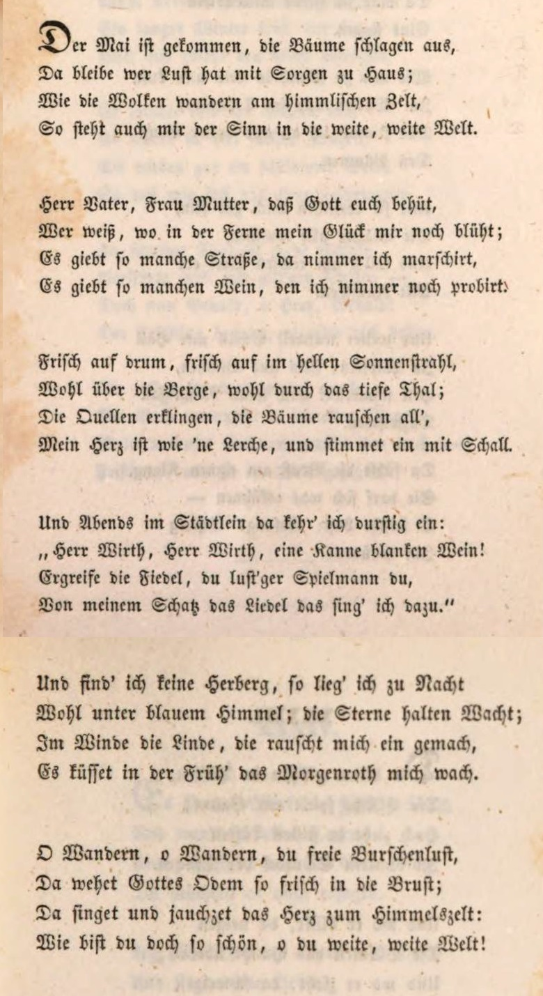 Der Mai ist gekommen - Druckfassung 1848